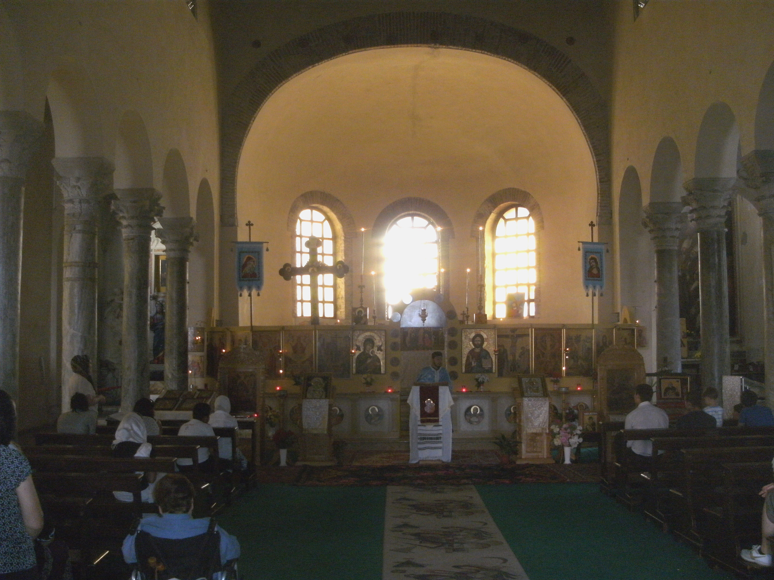 Ravenna, Kirche Spirito Santo, Blick in Richtung Altar.